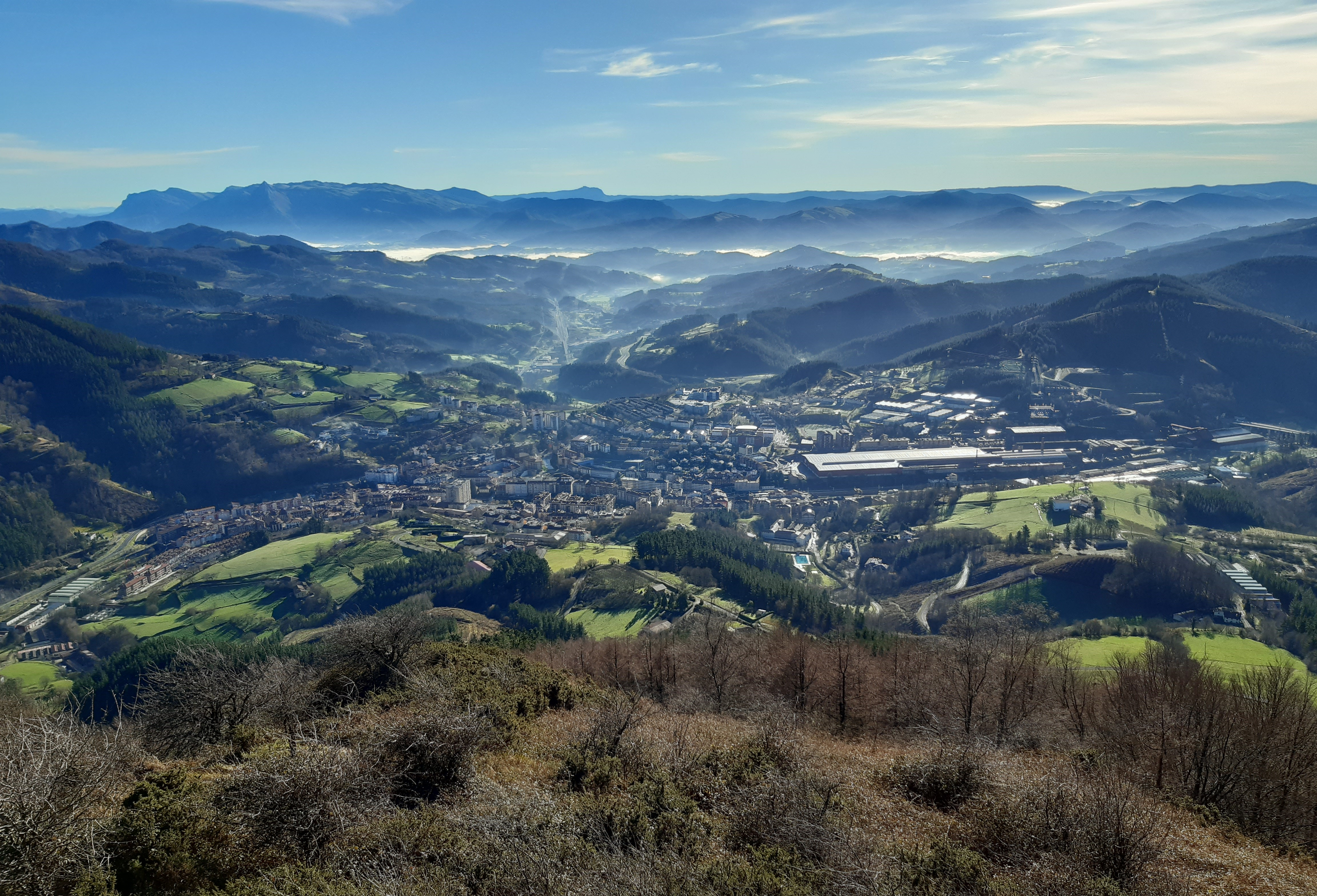 Urretxu eta Zumarragaren ikuspegia Irimo gailurretik, Gipuzkoa, Euskal Herria